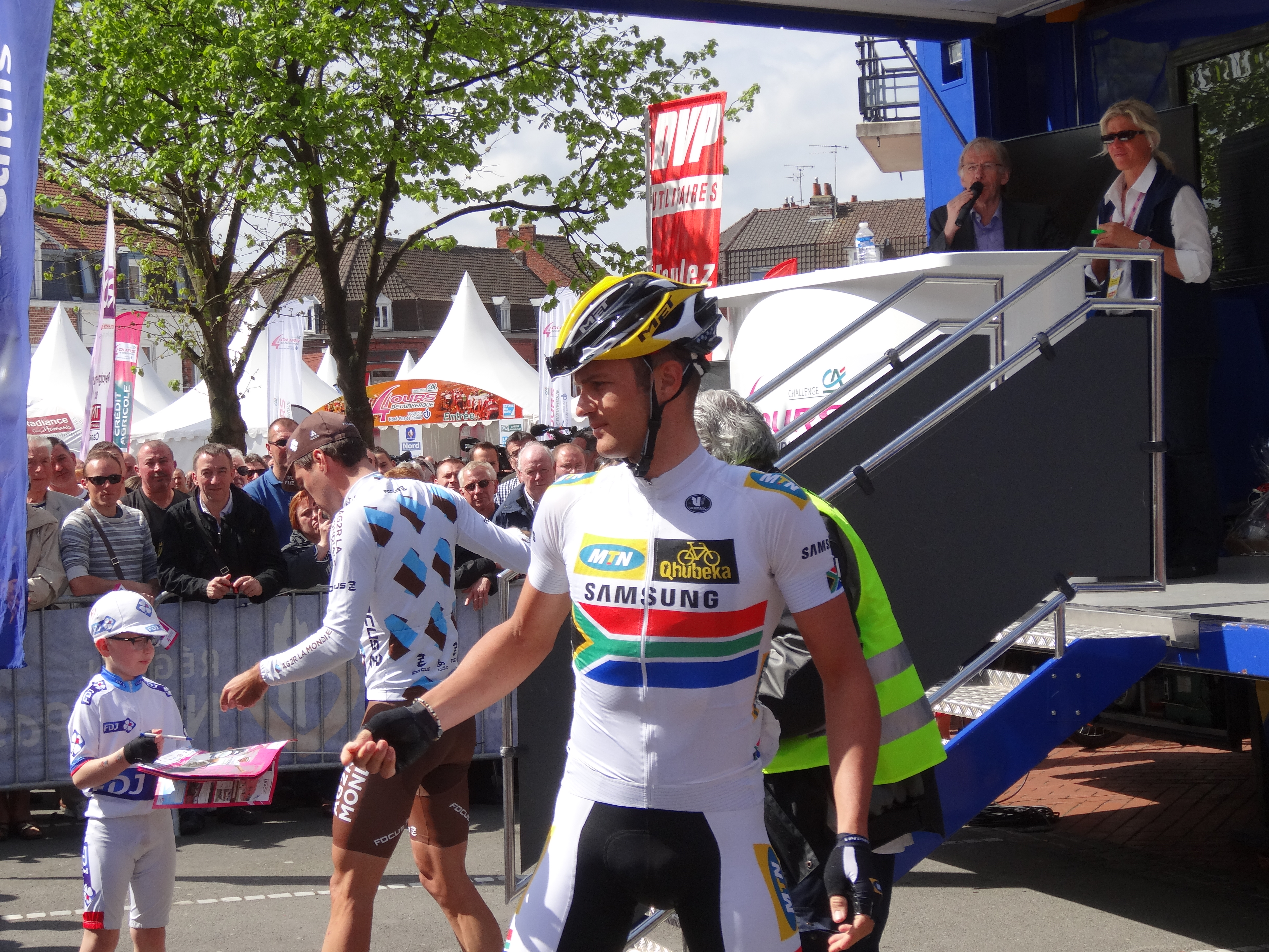 Reportage photographique réalisé le dimanche 5 mai 2013 au départ de la cinquième et dernière étape de l'édition 2013 des Quatre jours de Dunkerque à Estaires, Nord, Nord-Pas-de-Calais, France. Depicted person: Jay Robert Thomson